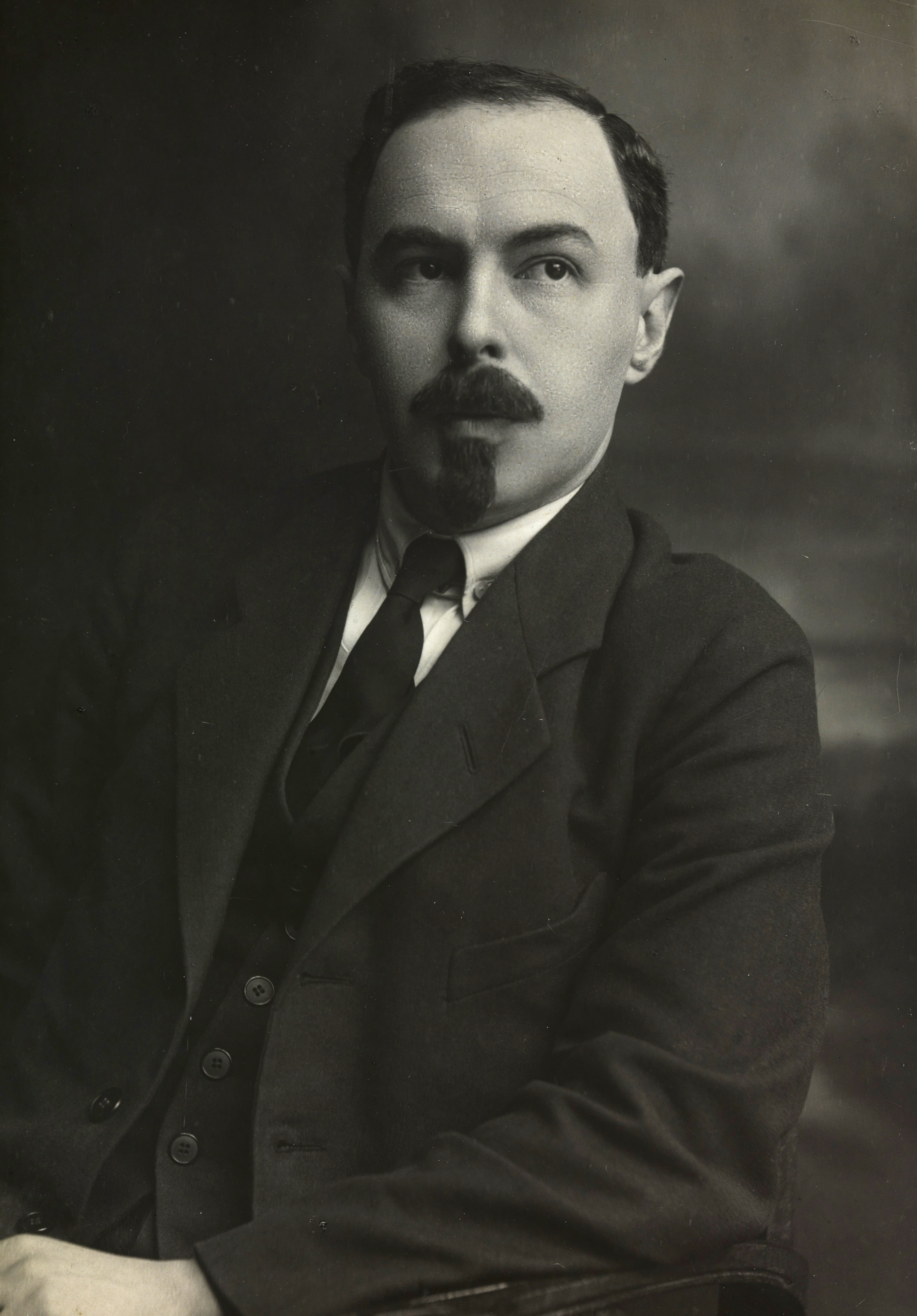 Sokolnikov, folkekommissær for Finansdepartementet. Depicted person: Sokolnikov Depicted place: Russia